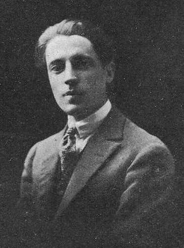 Rafael Dieste, fotografía en Vida Gallega 1926